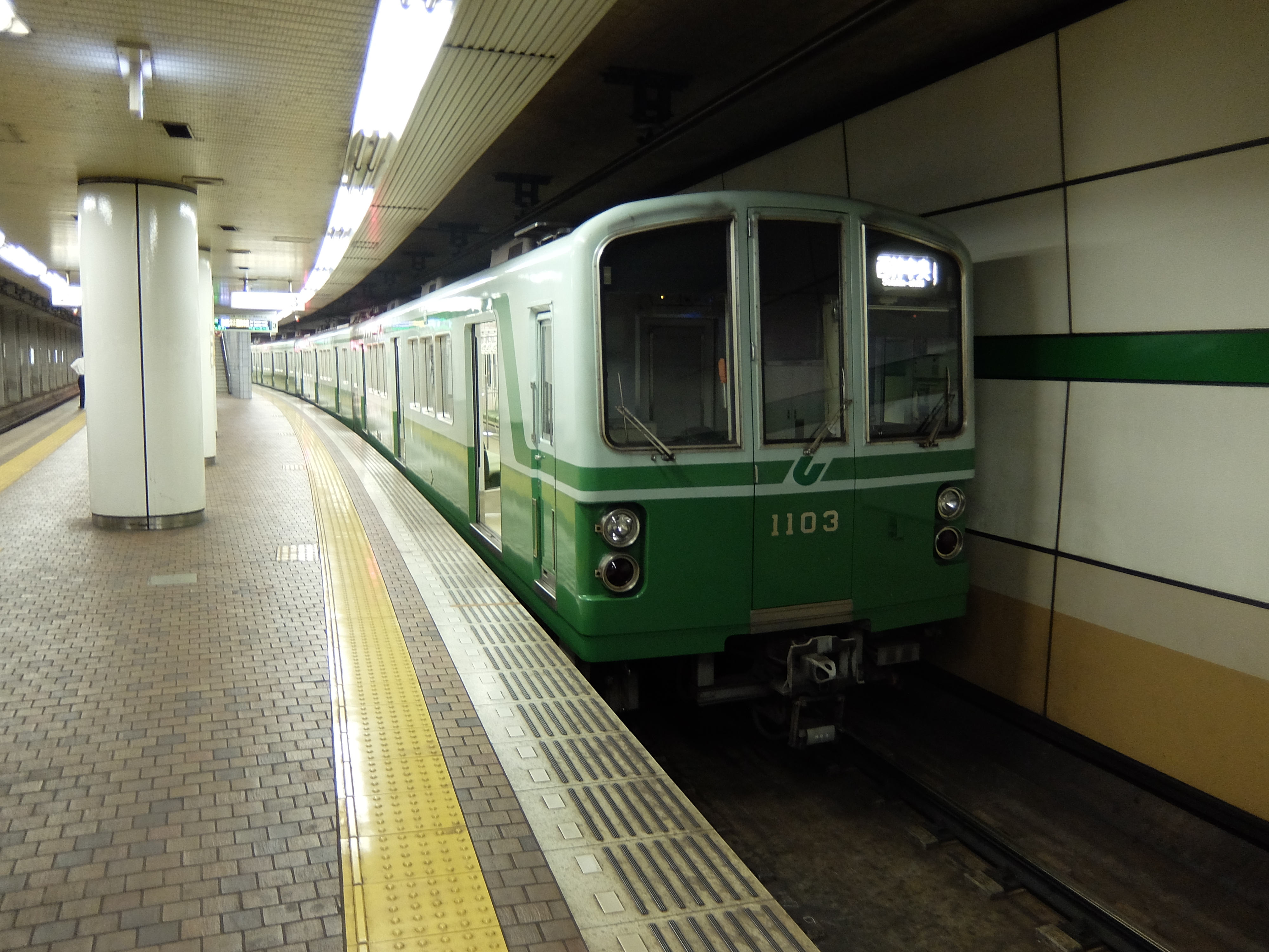 神戸市交通局1000形 1次車